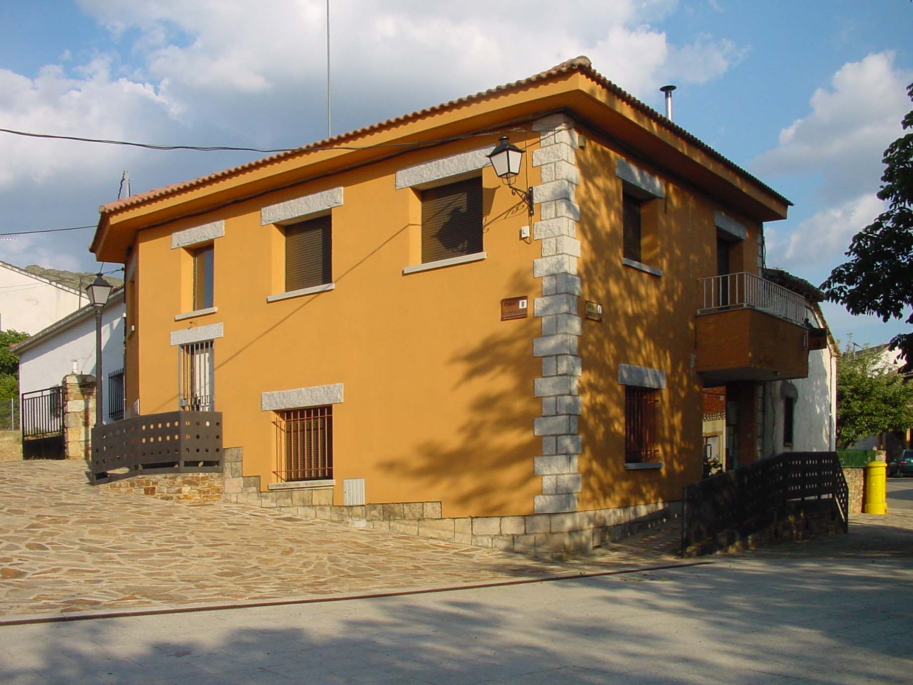 Ayuntamiento de Berzosa del Lozoya.